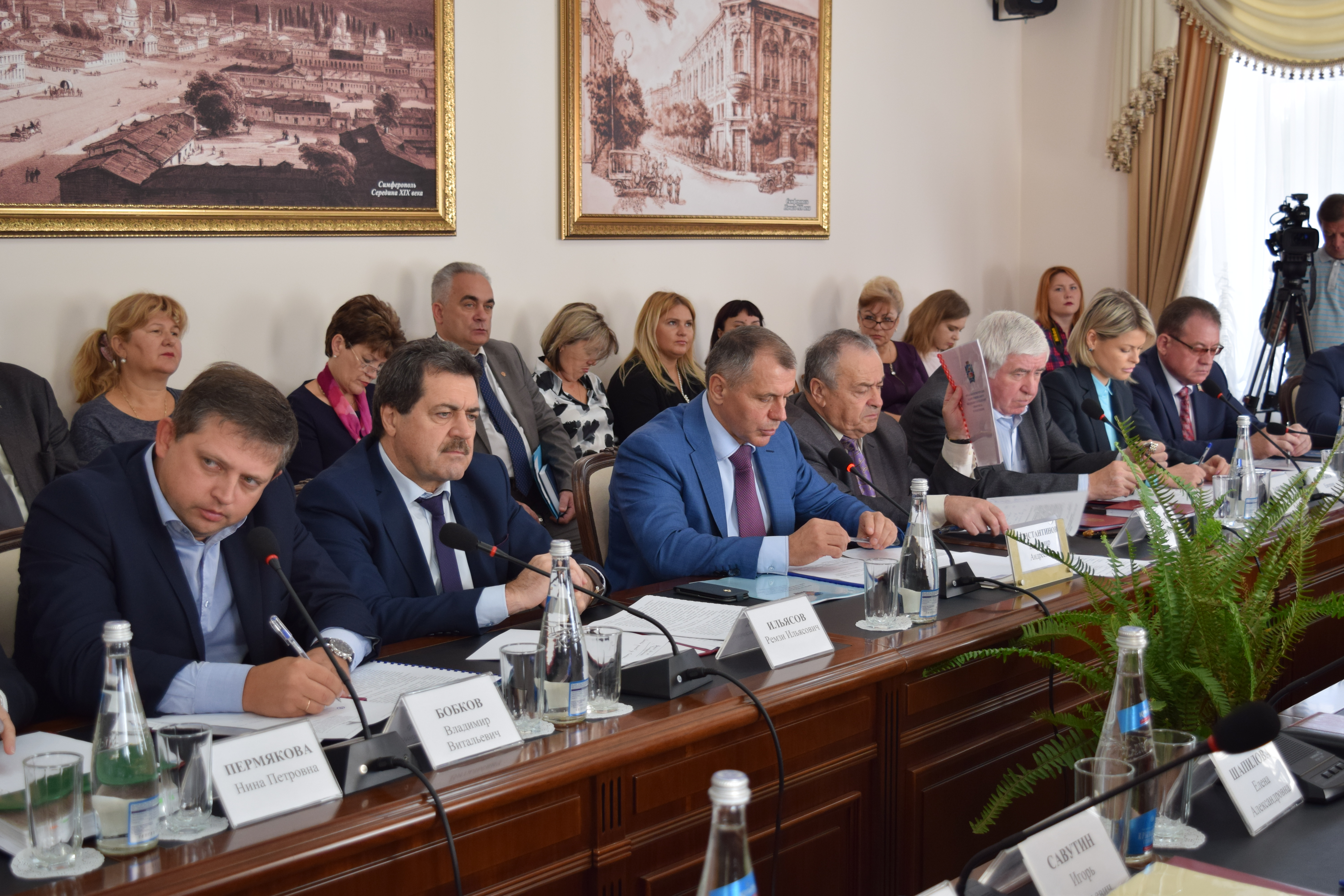 11.10.2017 Ежегодно на полуострове проходят Дни Государственного Совета Республики Крым, направленные на организацию открытого диалога представителей республиканской и муниципальной власти. Чиновники поднимают и обсуждают наиболее актуальные проблемы жизнедеятельности муниципалитетов Крыма. Совместная работа позволяет не только определить приоритетные направления, но и выработать эффективные пути решения проблемных вопросов.